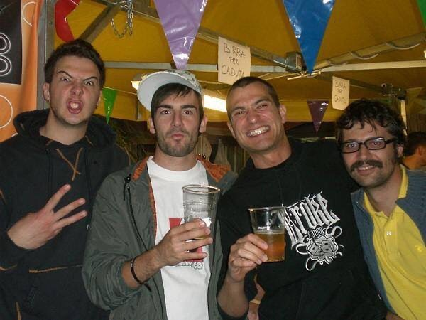 I Rumatera nel 2009